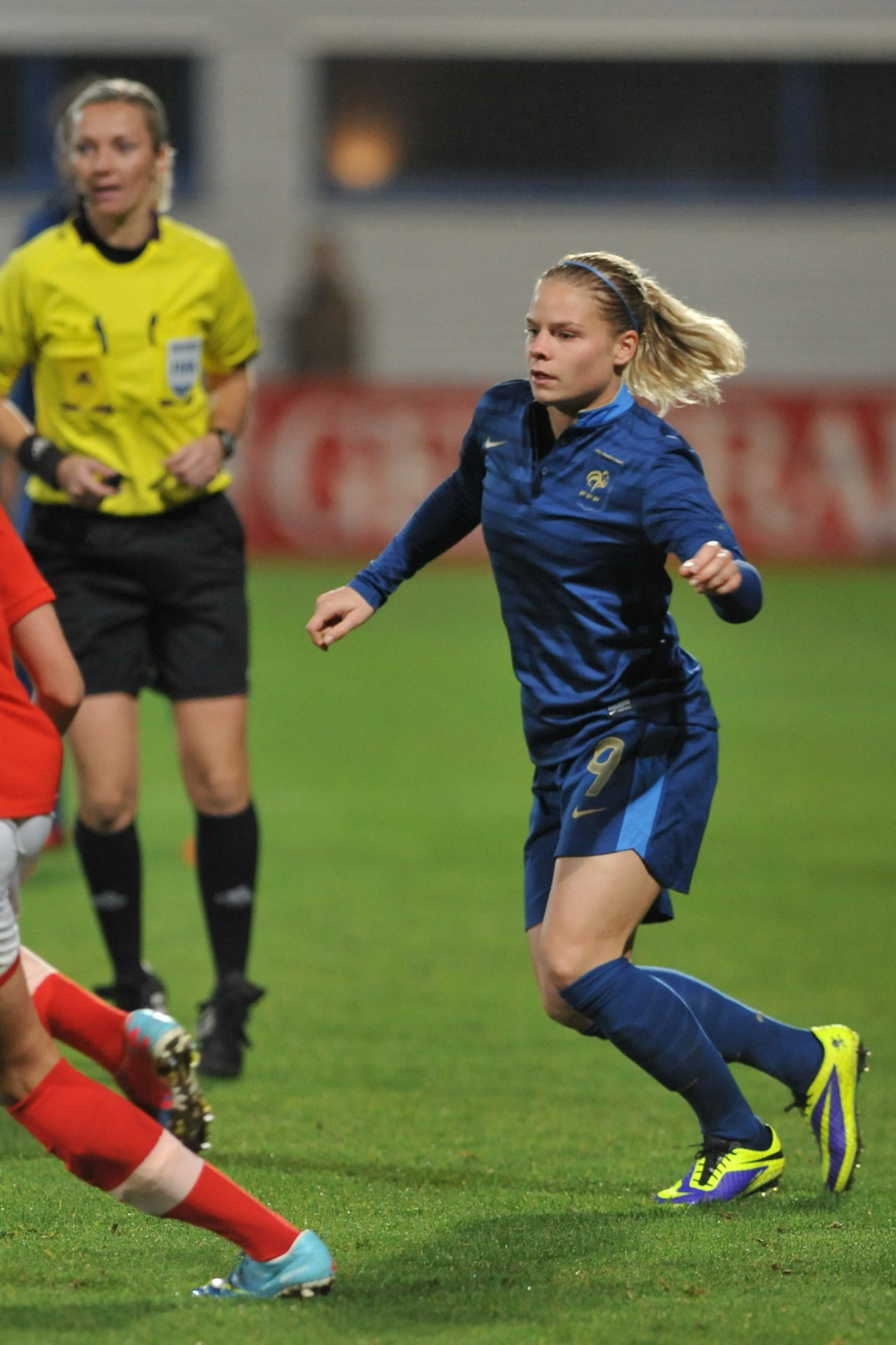 FIFA Women's World Cup 2015 Qualiying Round Österreich - Frankreich am 31. Oktober 2013 in Ritzing: Eugénie Le Sommer